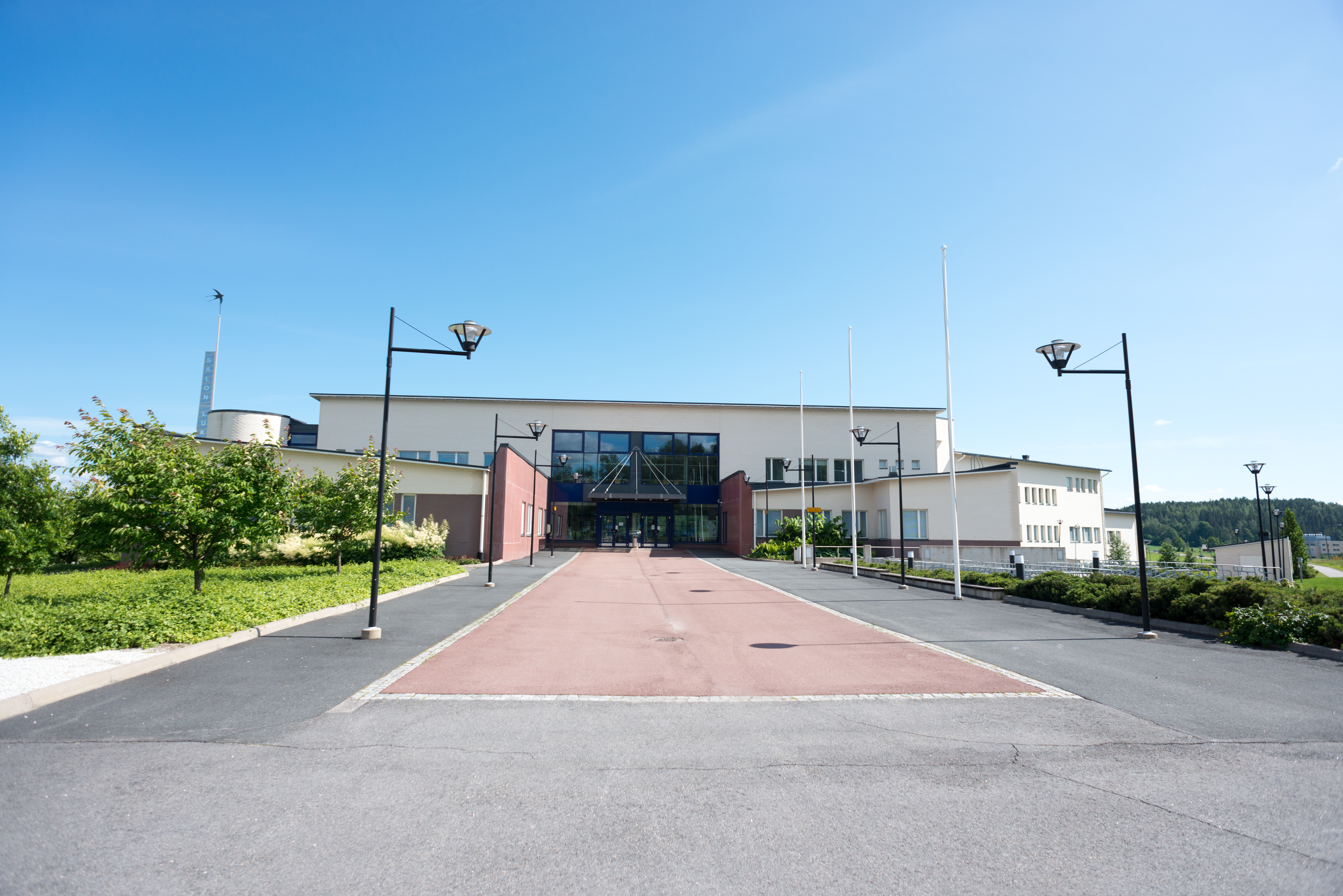 Salon lukio Salossa